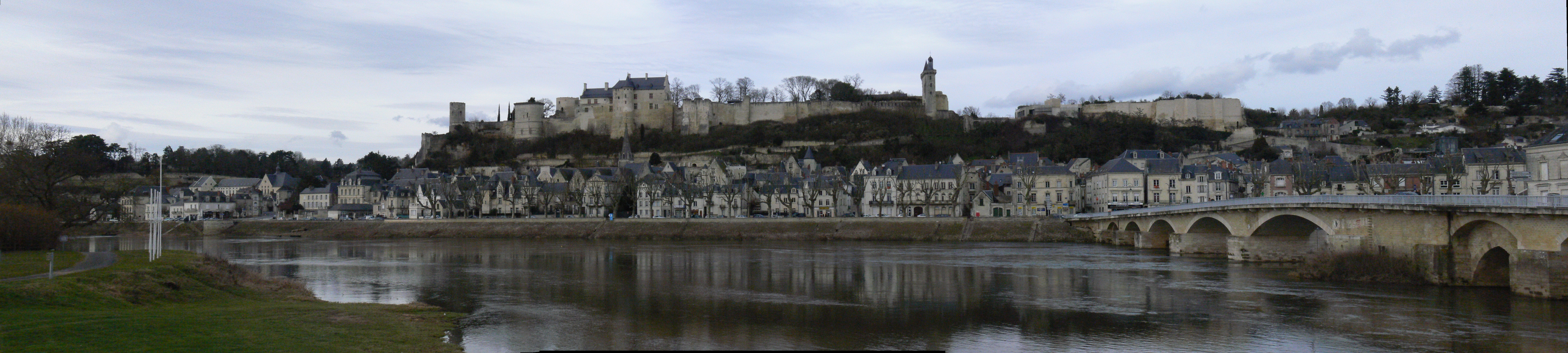 Panoramique de la ville et du château de Chinon